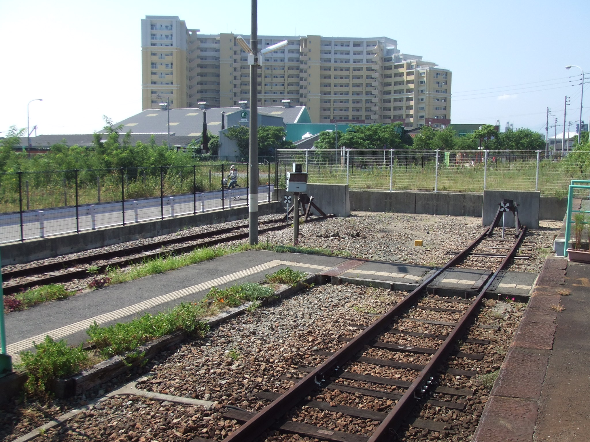 西戸崎駅 終端